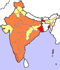 Kartorna bygger på resultat i senaste delstatsval (Juni 2004). Rött betyder att partiet deltar i delstatsregeringen, orange att partiet vann mandat i senaste delstatsvalet och gult att partiet hade lanserat kandidater men utan att vinna mandat. Kartorna tar inte hänsyn till avhopp, partifusioner och fyllnadsval under den ordinarie mandatperiodens gång.